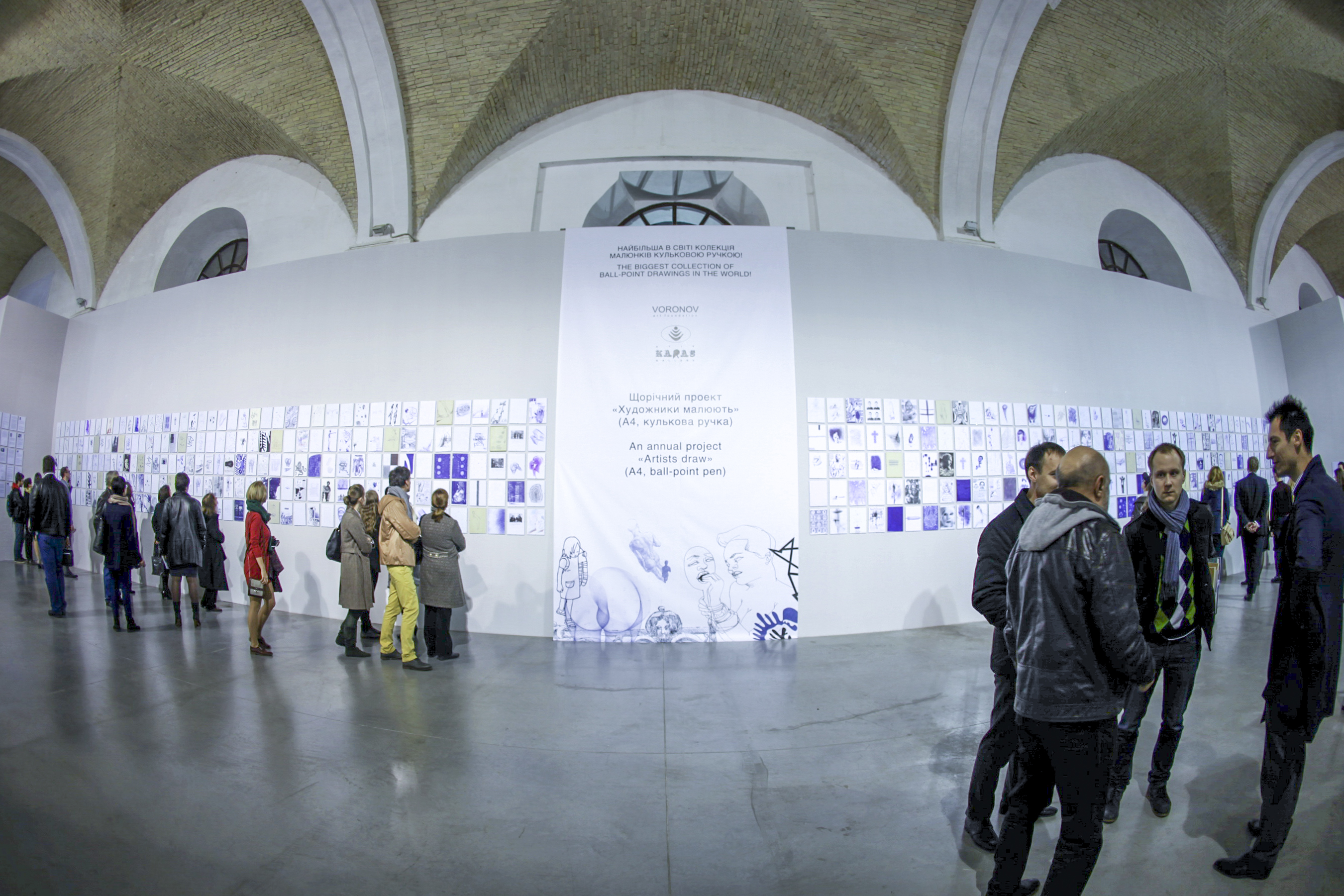 Проект галереї "А4, Кулькова ручка" на Art Kyiv в Мистецькому Арсеналі, 2013